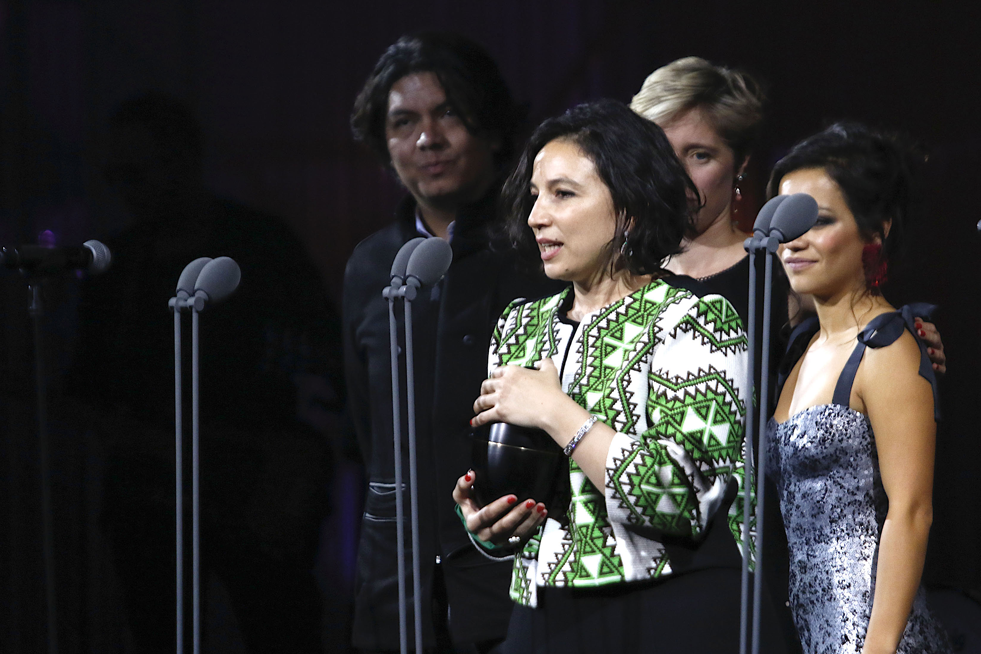 Miércoles 7 de noviembre de 2018. En el Teatro de la Ciudad Esperanza Iris, se realizó la entrega de Premios Fénix a lo mas destacado de la cinematografía Iberoamericana, los ganadores Largometraje de ficción: Los pájaros de verano, Actuación Femenina: Carmiña Martínez, por Pájaros de verano, Música original: Leonardo Heiblum por Pájaros de verano. Fotografía de Milton Martínez / secretaría de Cultura CDMX.